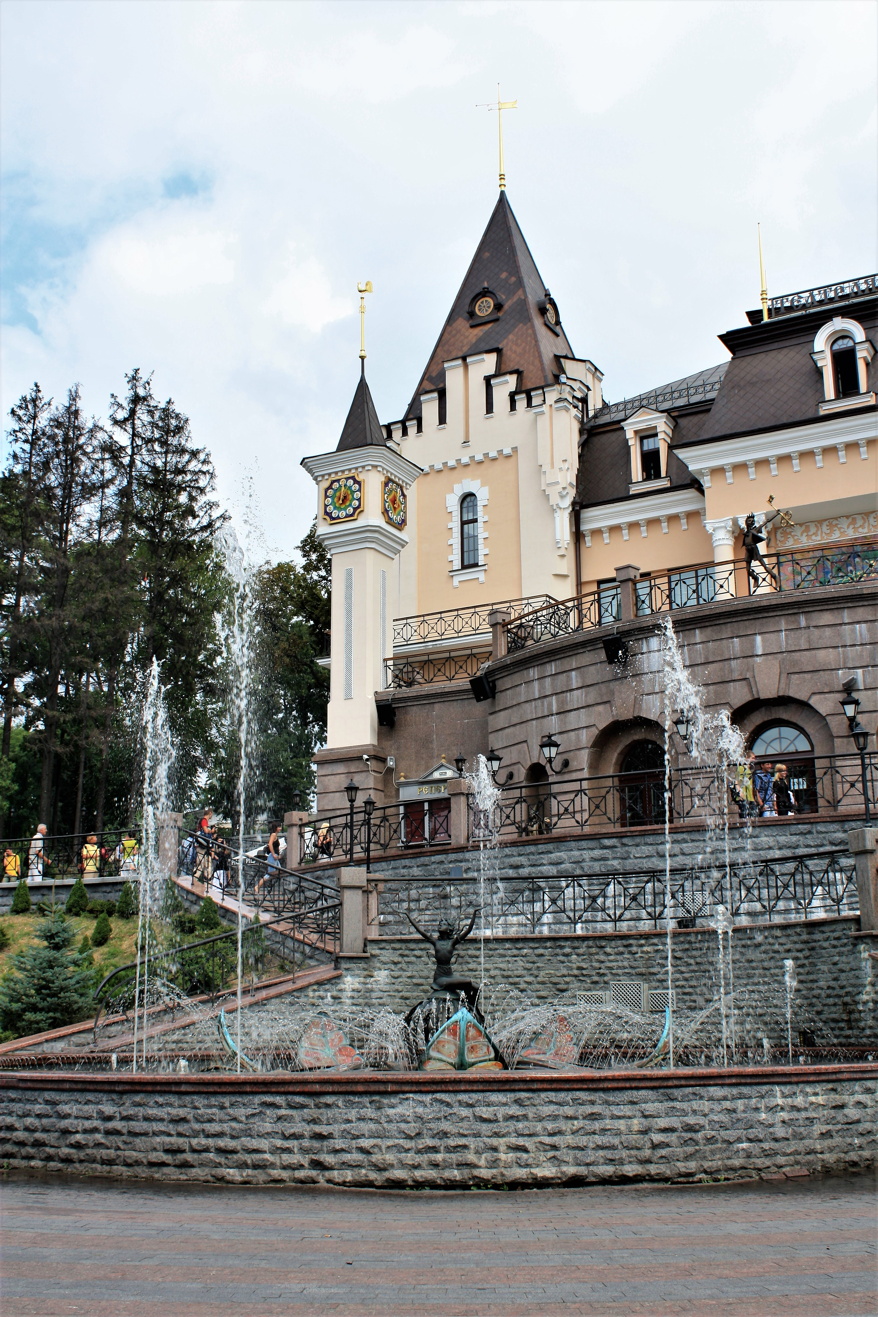 Київський державний академічний театр ляльок